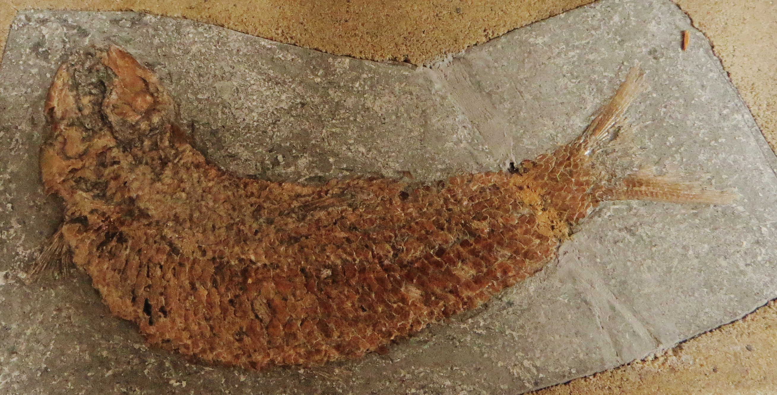 Fossil- Took the picture at Teylers Museum, Haarlem